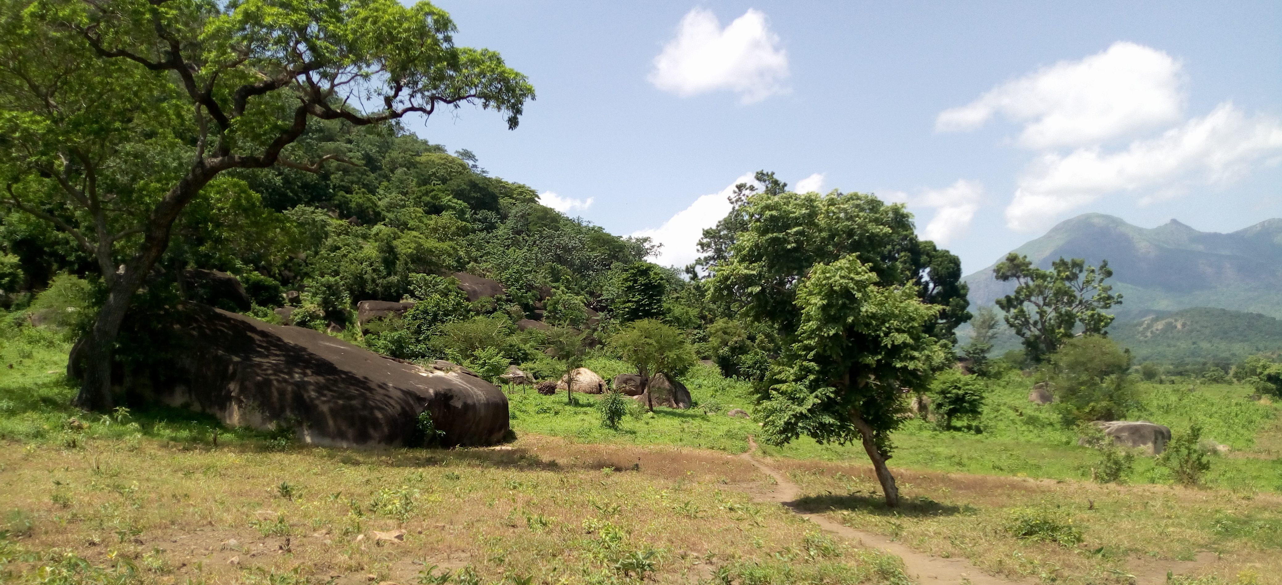 La ville de Poli est au creux des montagnes comme celle ci